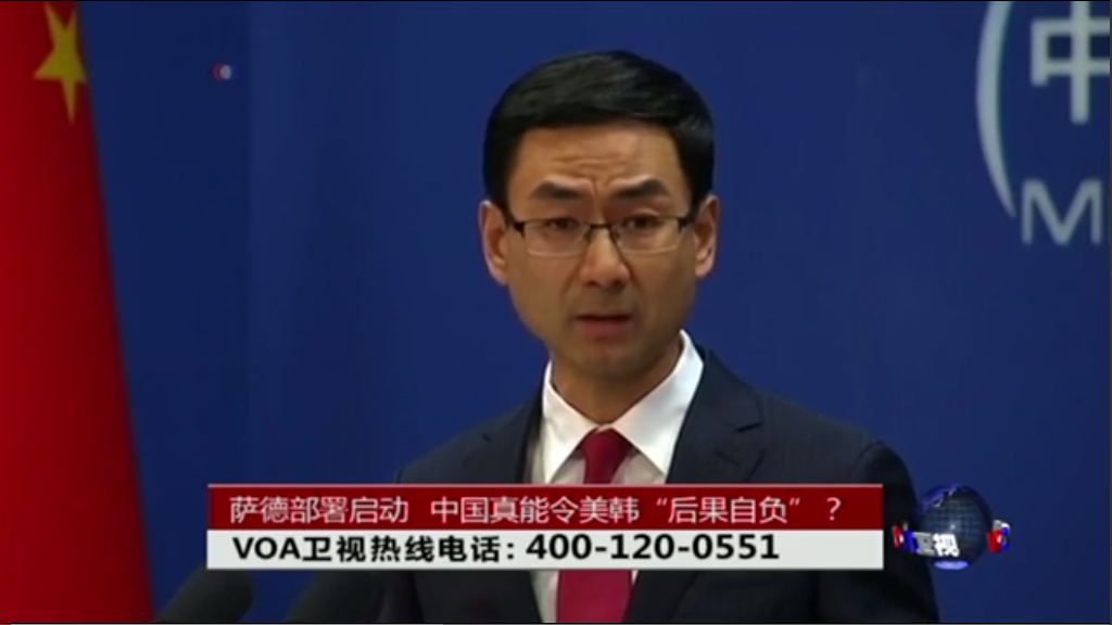 中文（中国大陆）: 中国外交部发言人耿爽